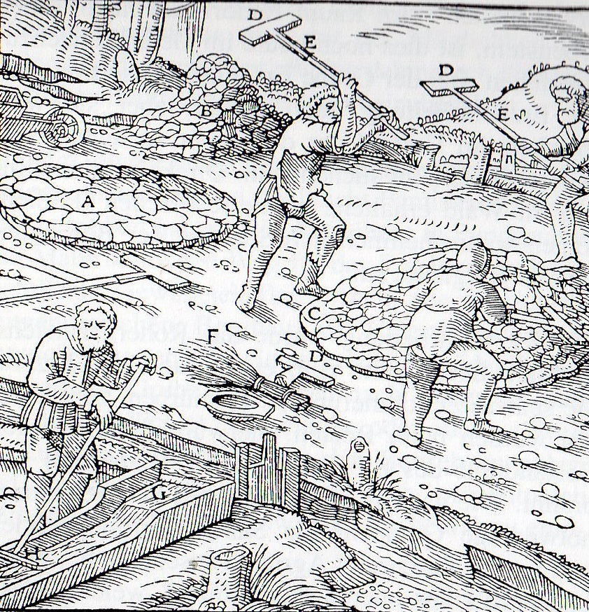 Darstellung der Bleiverarbeitung in Westfalen nach Georgius Agricola (1556)